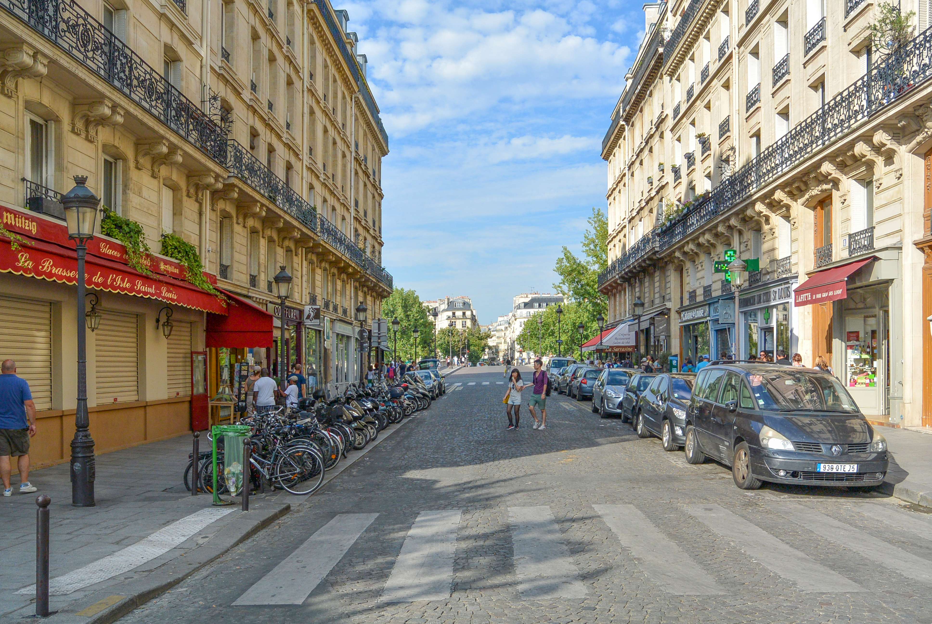 Rue Jean-du-Bellay, Paris.